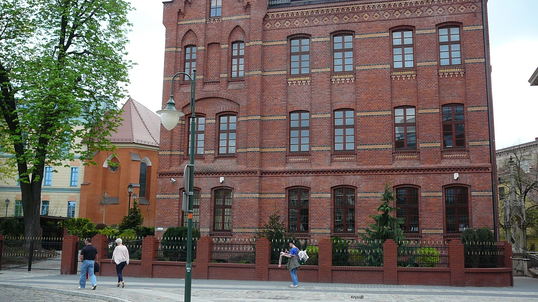 Opole